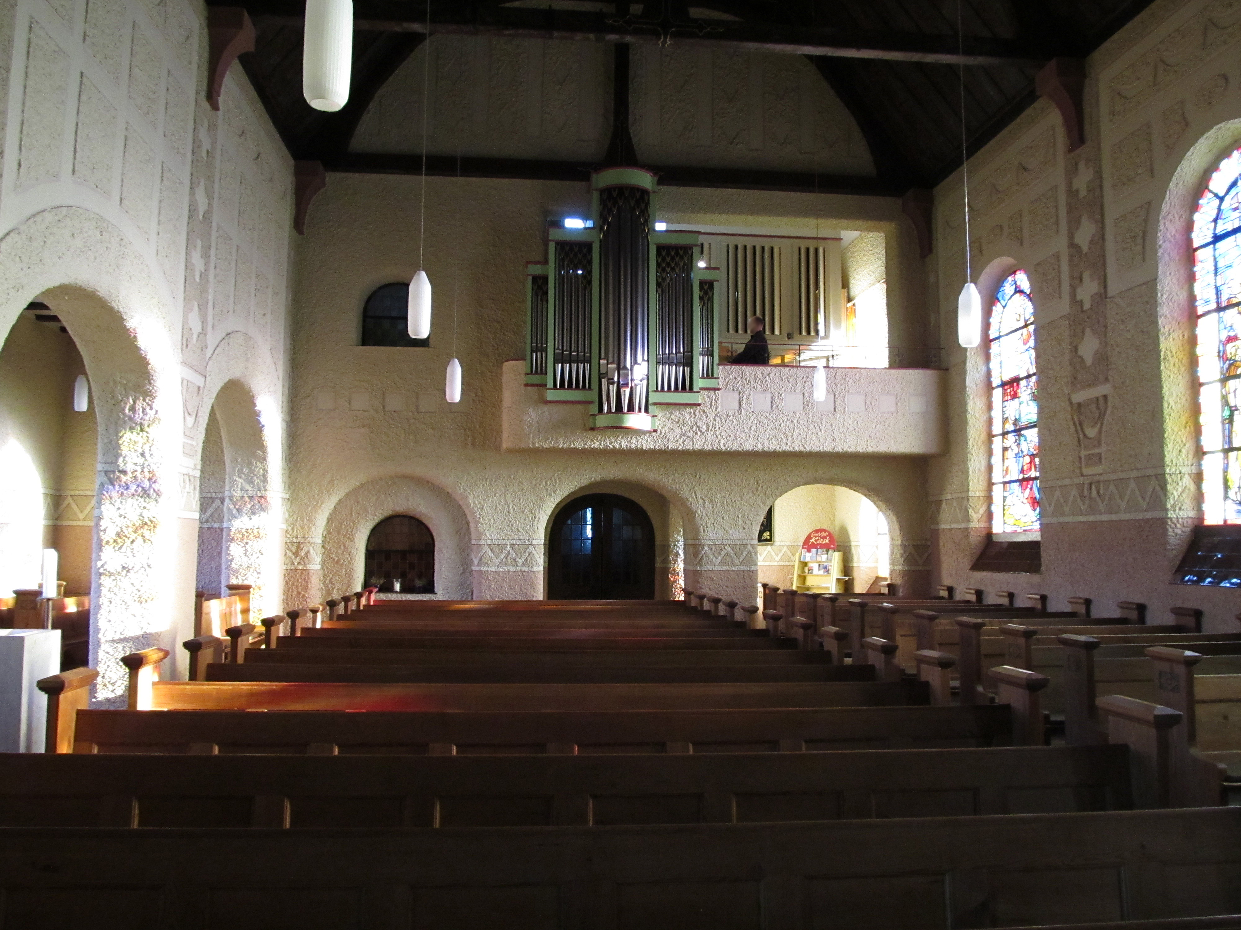 Blick ins Innere der protestantischen Kirche in Hassel, einem Stadtteil von St. Ingbert, Saarland